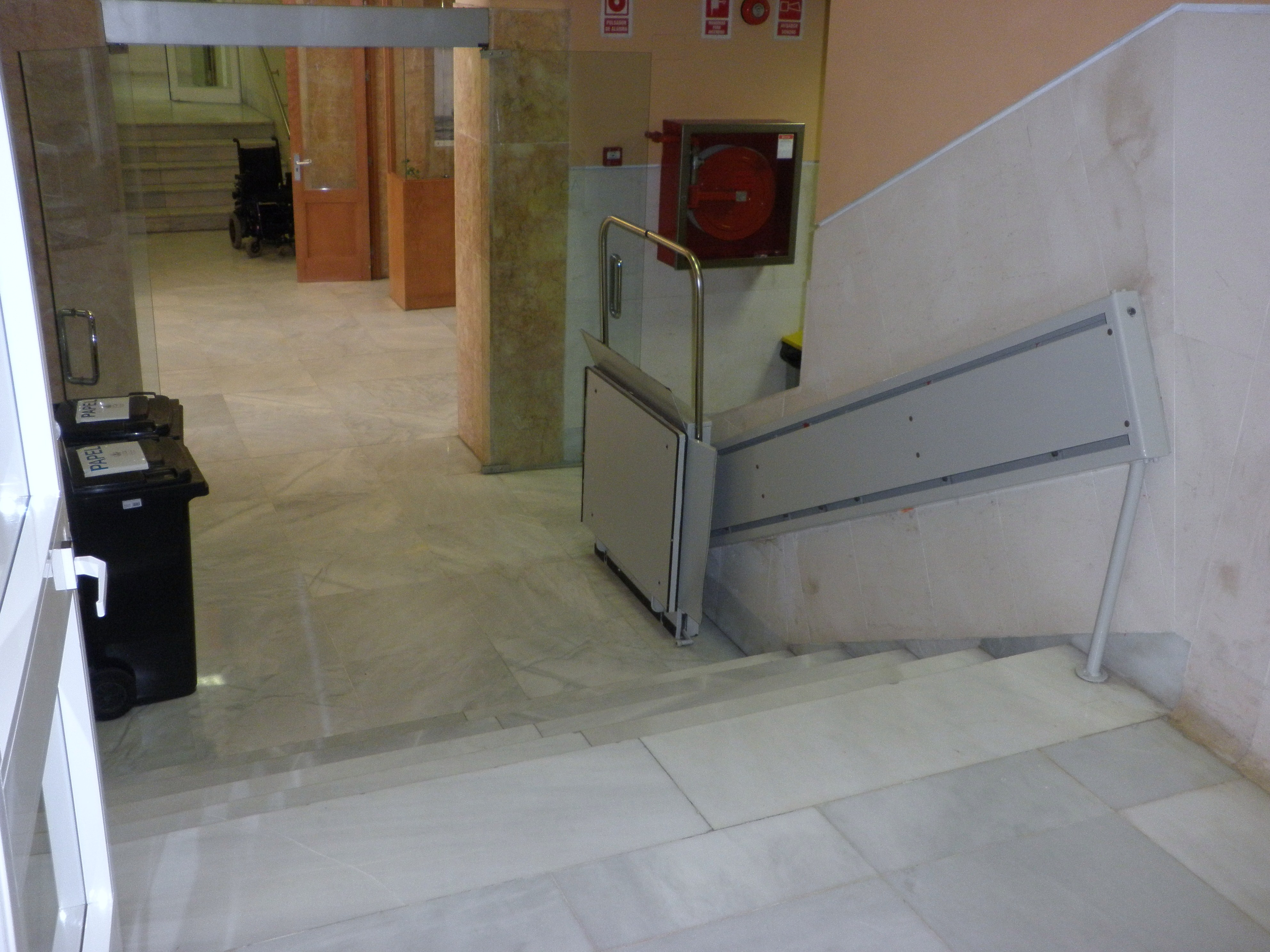 Acceso para minusváldos, Universidad de Cádiz, España.